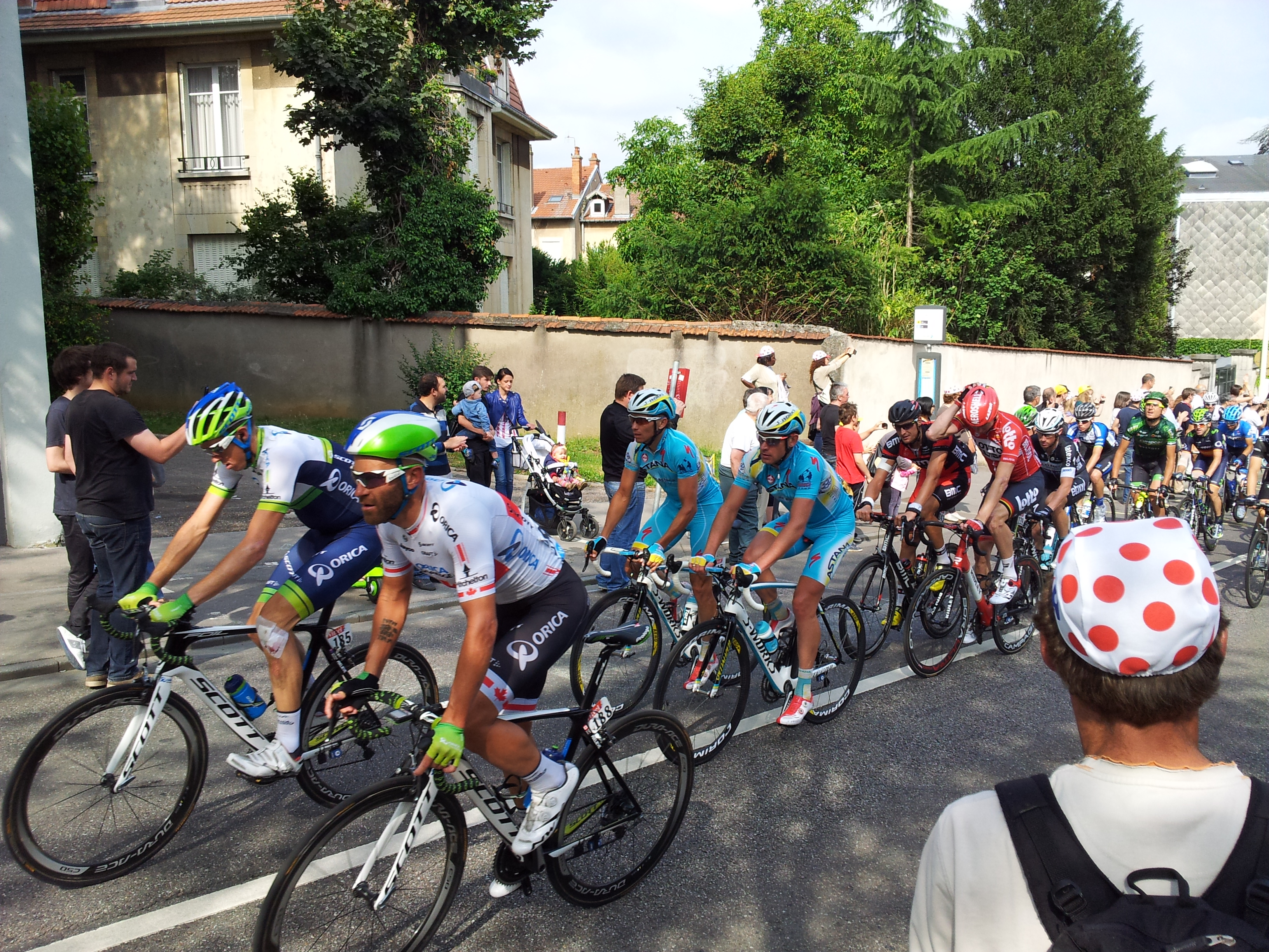 7e étape du Tour de France 2014 au début de la Côte de Boufflers.